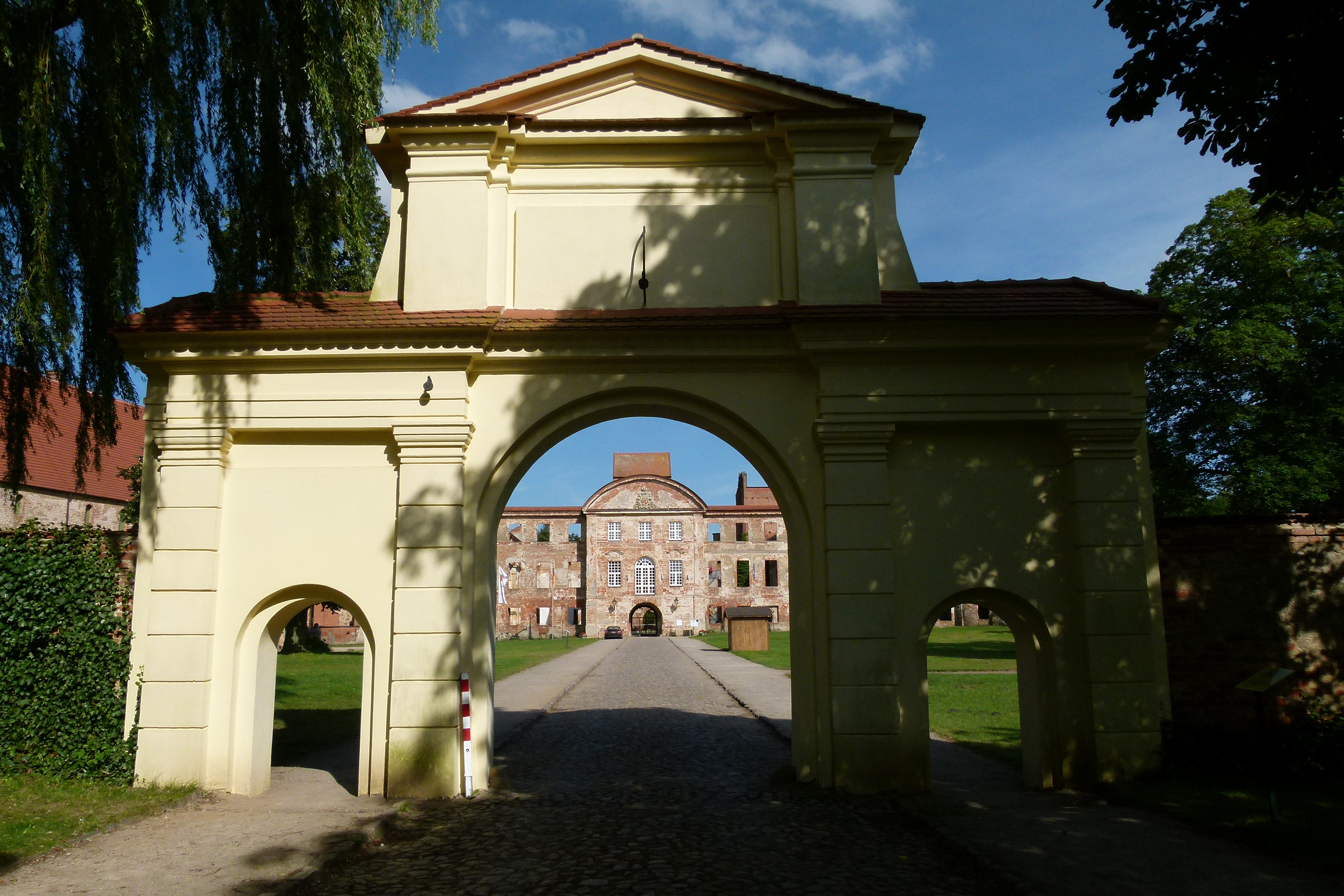 Kloster und Schloss Dargun - mit dem Gelben Tor